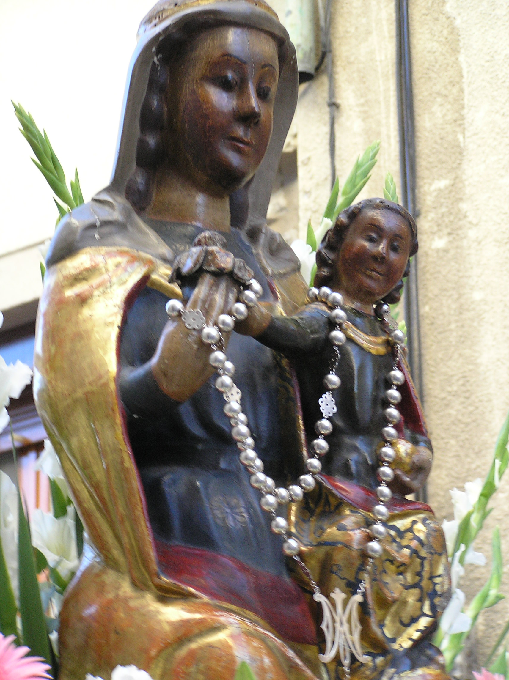 Imagen de Nuestra Señora del Rosario, patrona de la villa de Cuéllar.